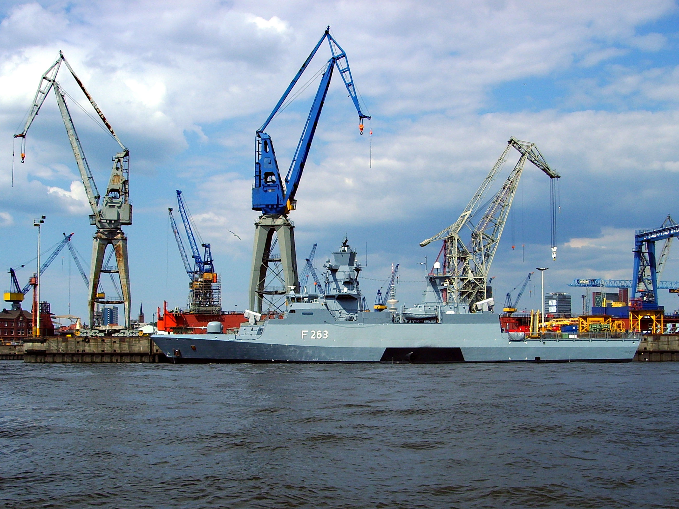 Die Korvette Oldenburg (RF 263) im Hamburger Hafen Source: own work Date: 06 June 2008, Hamburg, Germany Author: Maschinenjunge Licence: GFDL, cc-by 3.0